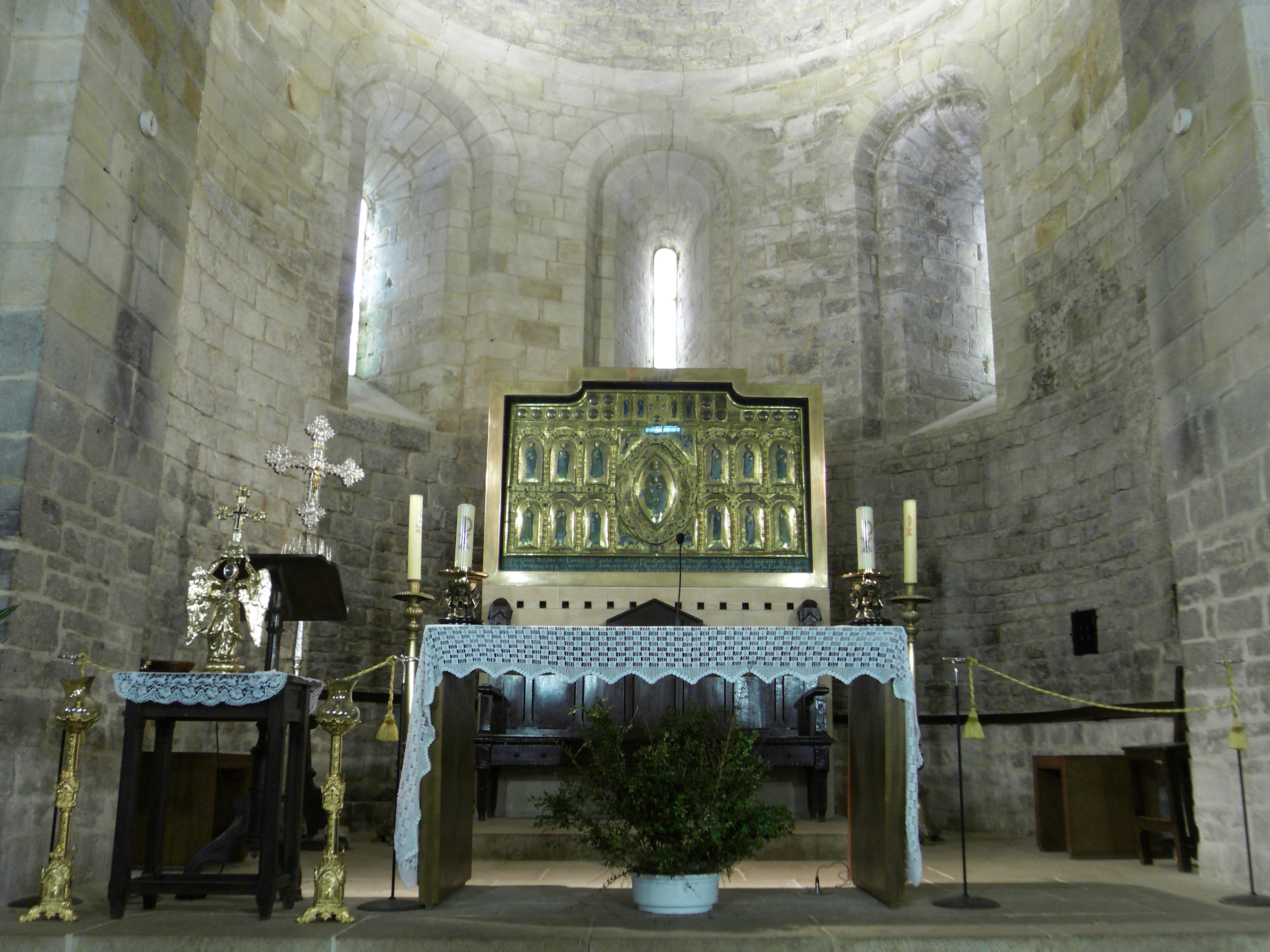 Aralarko San Migelen santutegiko aldarea eta erretaula erromanikoa (XII. mendea).